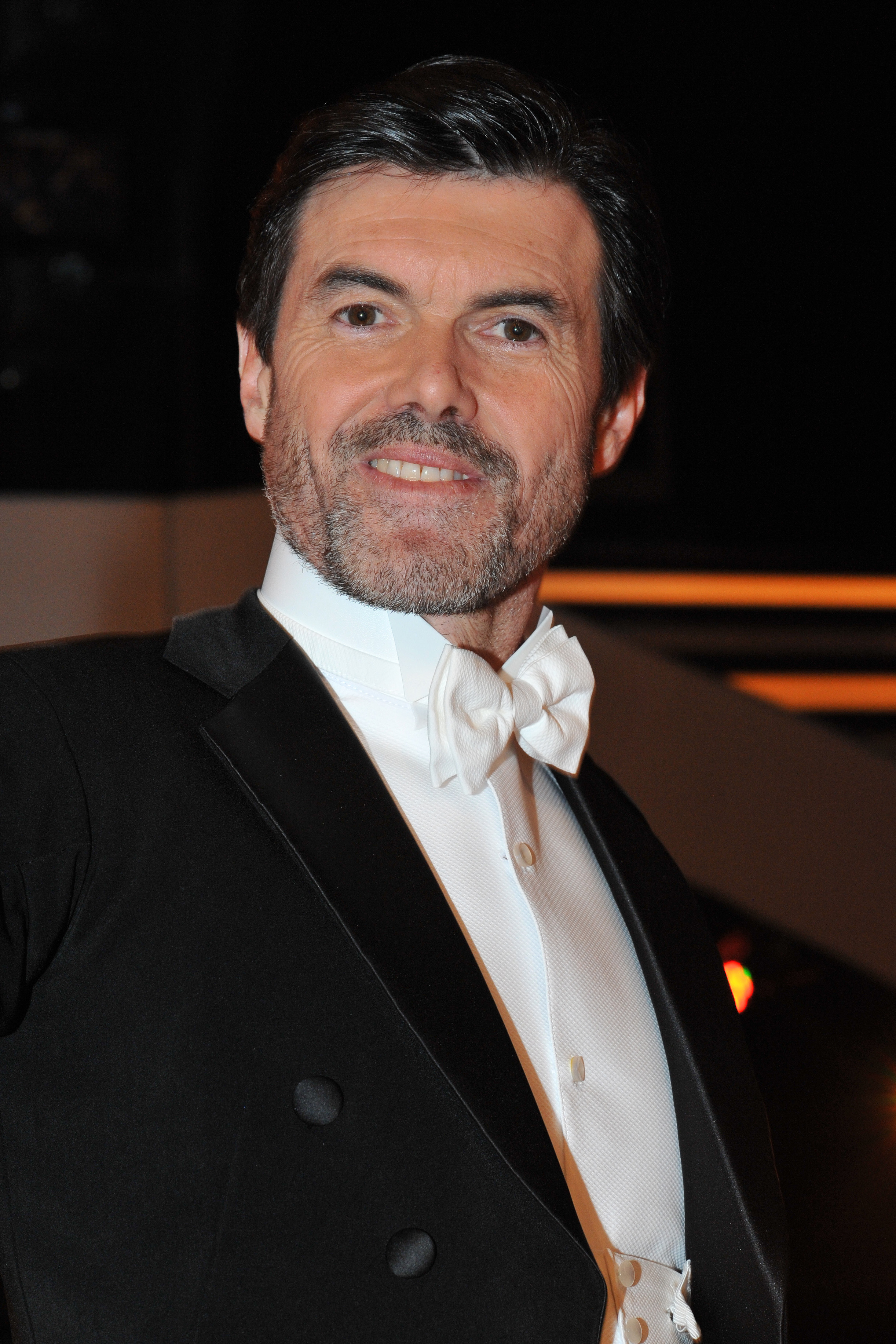 ORF Dancing Stars 2014: Hubert Neuper